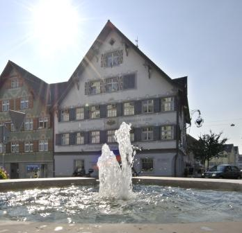 Der Adler – ein Stück Gossauer Geschichte